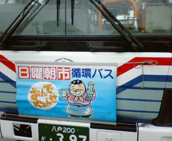 八戸市営バス・ワンコインバス・いさば号垂れ幕